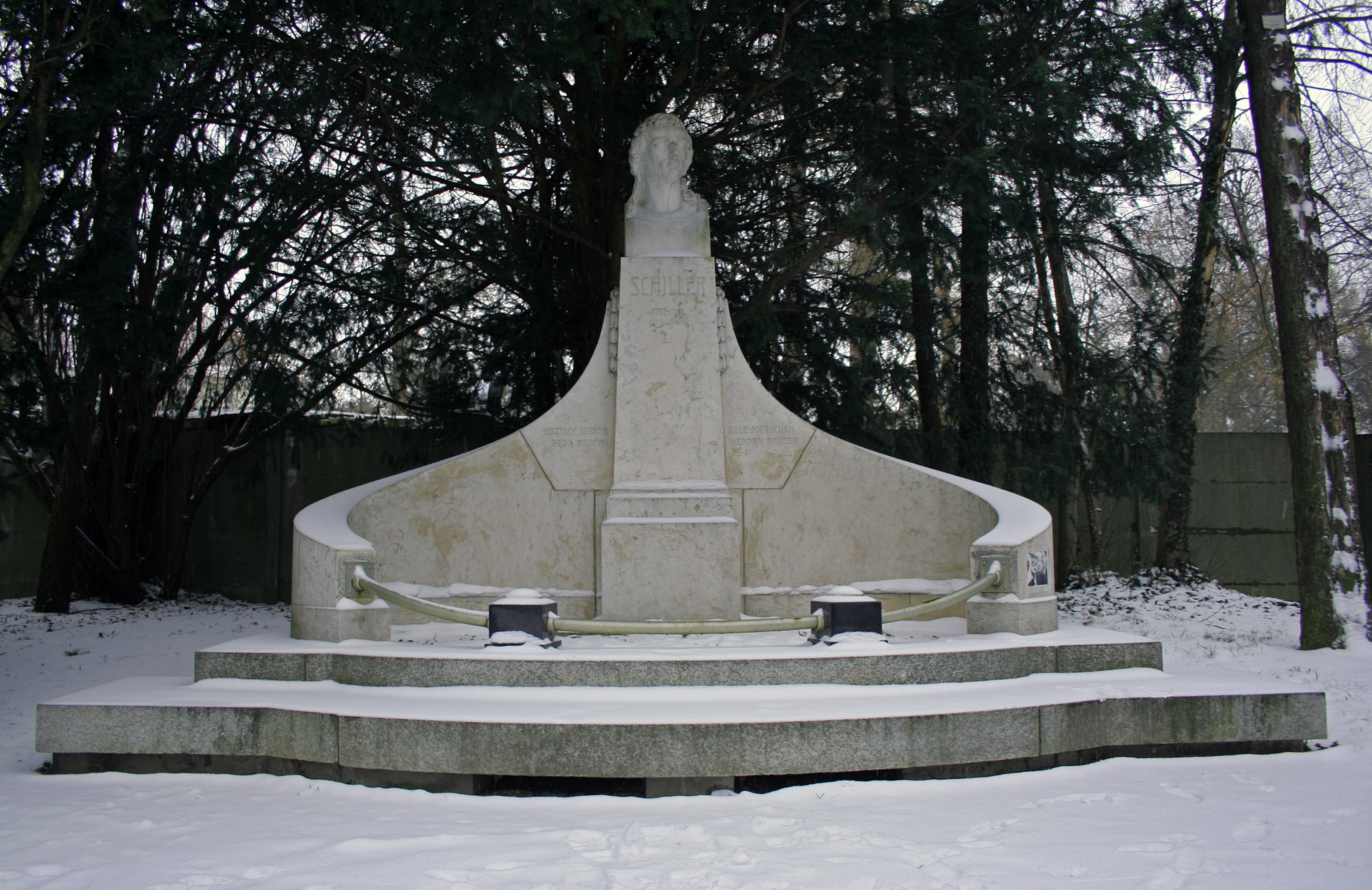 Pomnik Fryderyka Schillera w Parku Szcytnickim we Wrocławiu